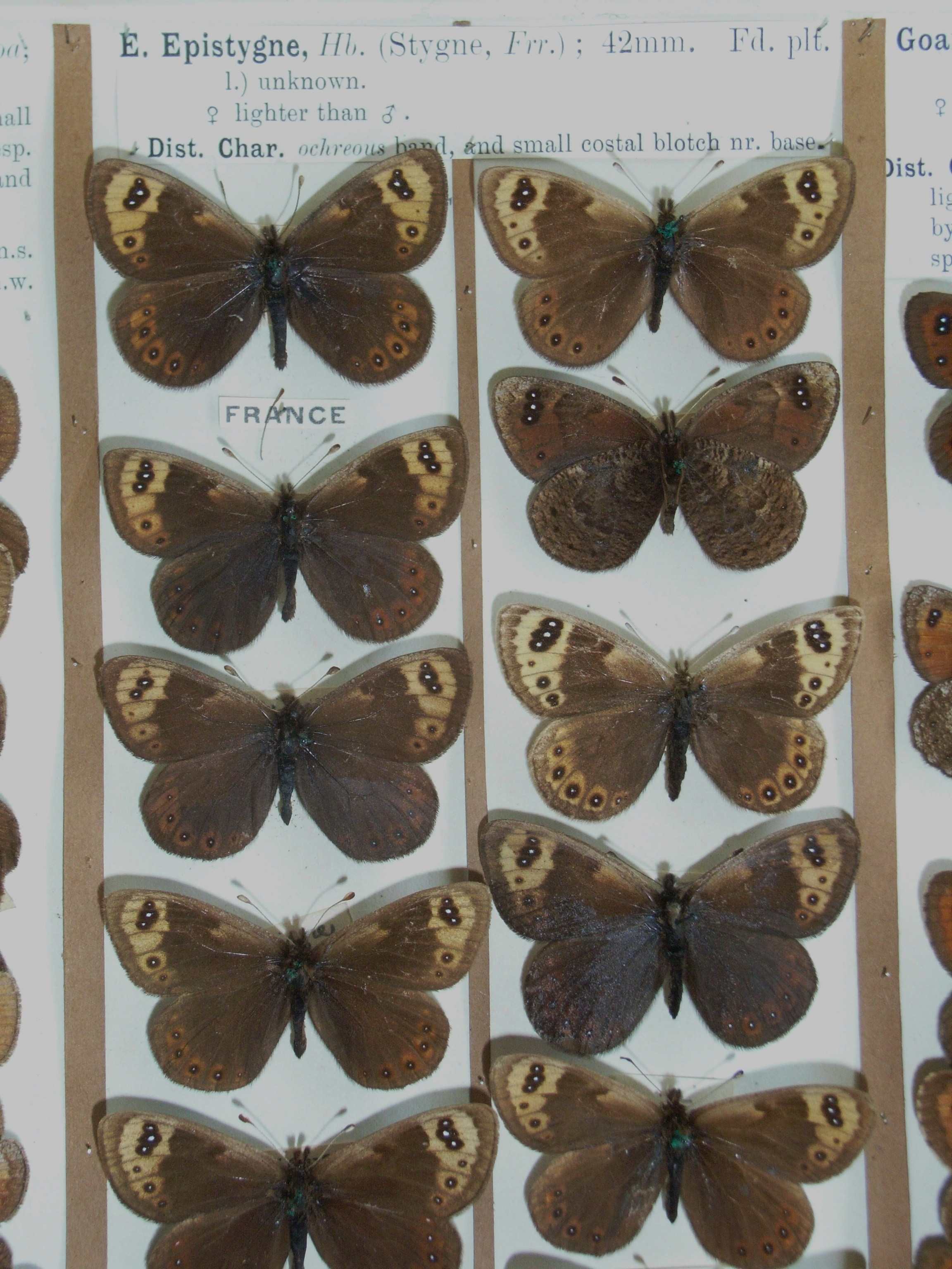 Erebia epistygne